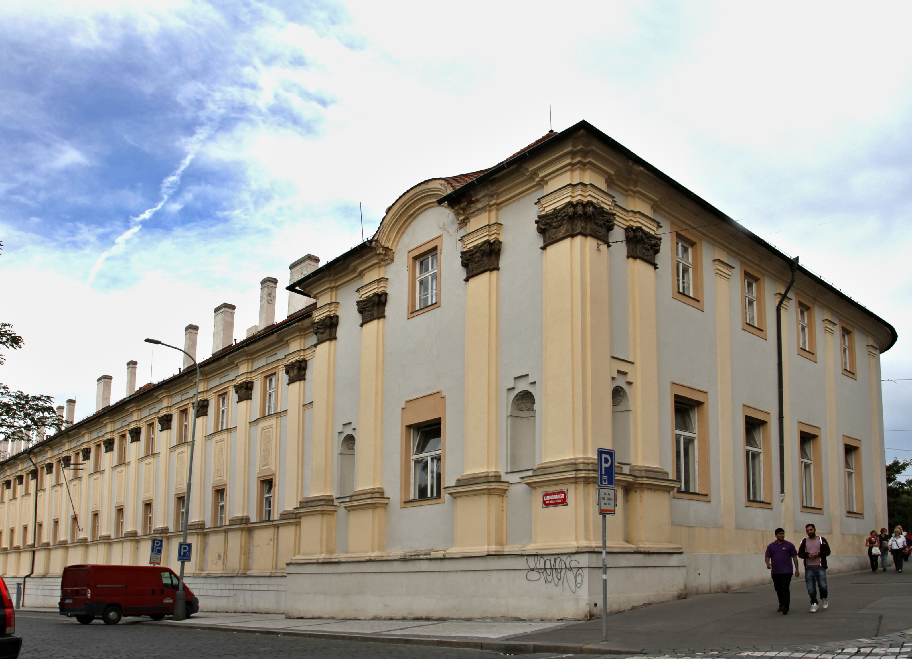 Kolej Jezuitská Novoměstská (Nové Město), Praha 2, Karlovo nám., U Nemocnice 504, Nové Město